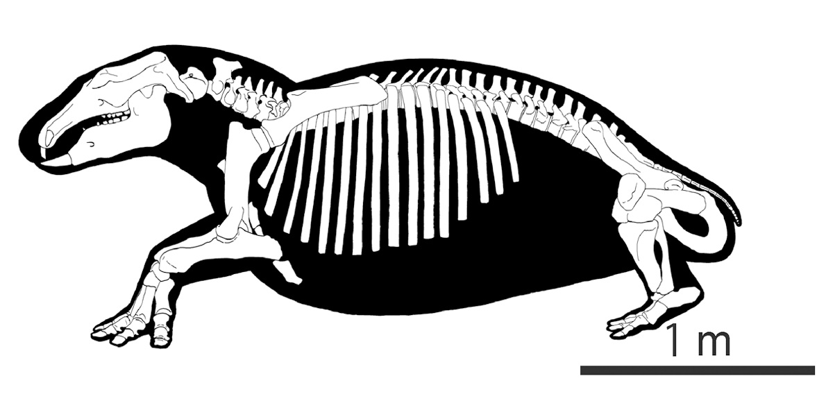 Skeletal illustration of Paleoparadoxia